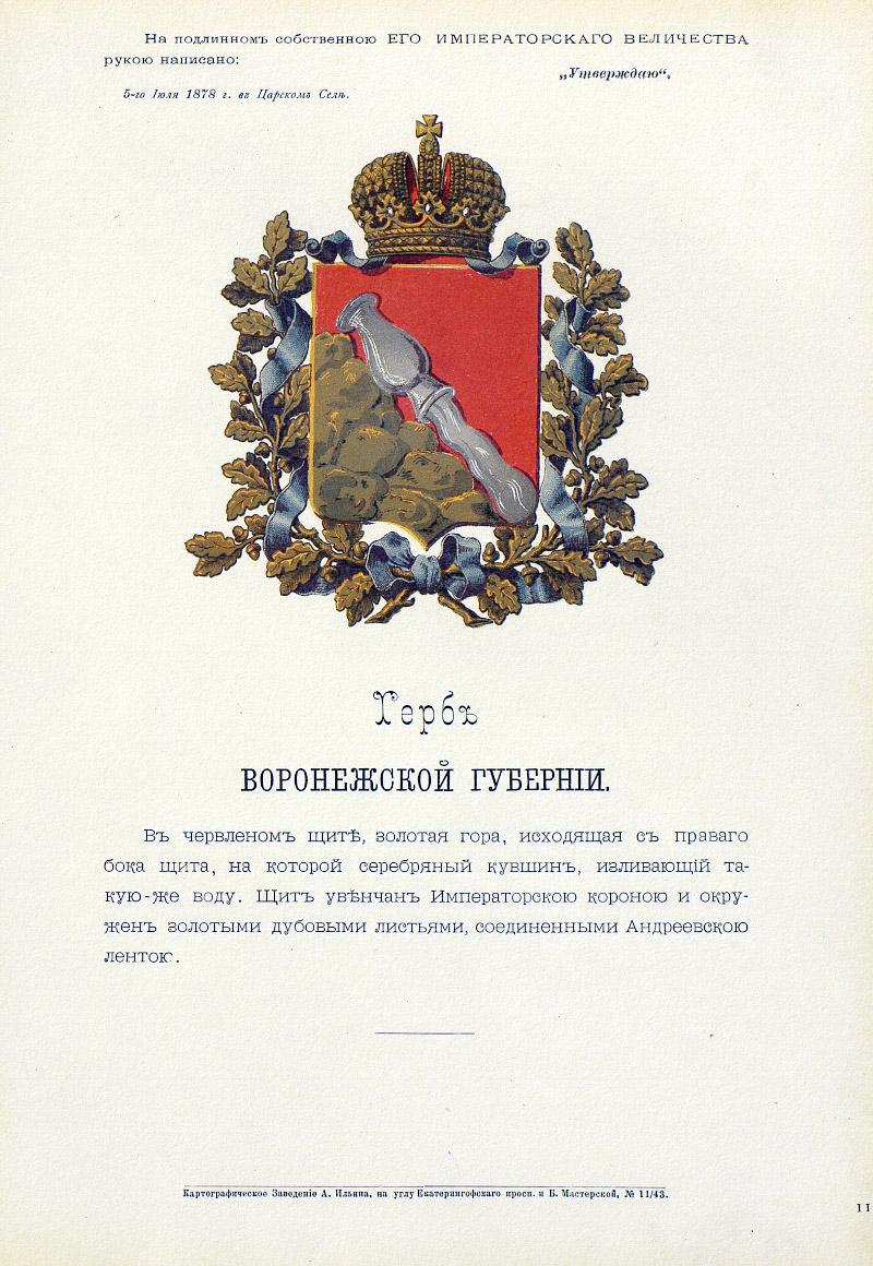 Official Russian Empire coat of arms Voronezh Governorate. Герб Российской Империи Воронежской губернии с официальным описанием в Гербовнике Министерства внутренних дел Российской Империи 1880 года. Утверждён Императором Всероссийским Александром Вторым.